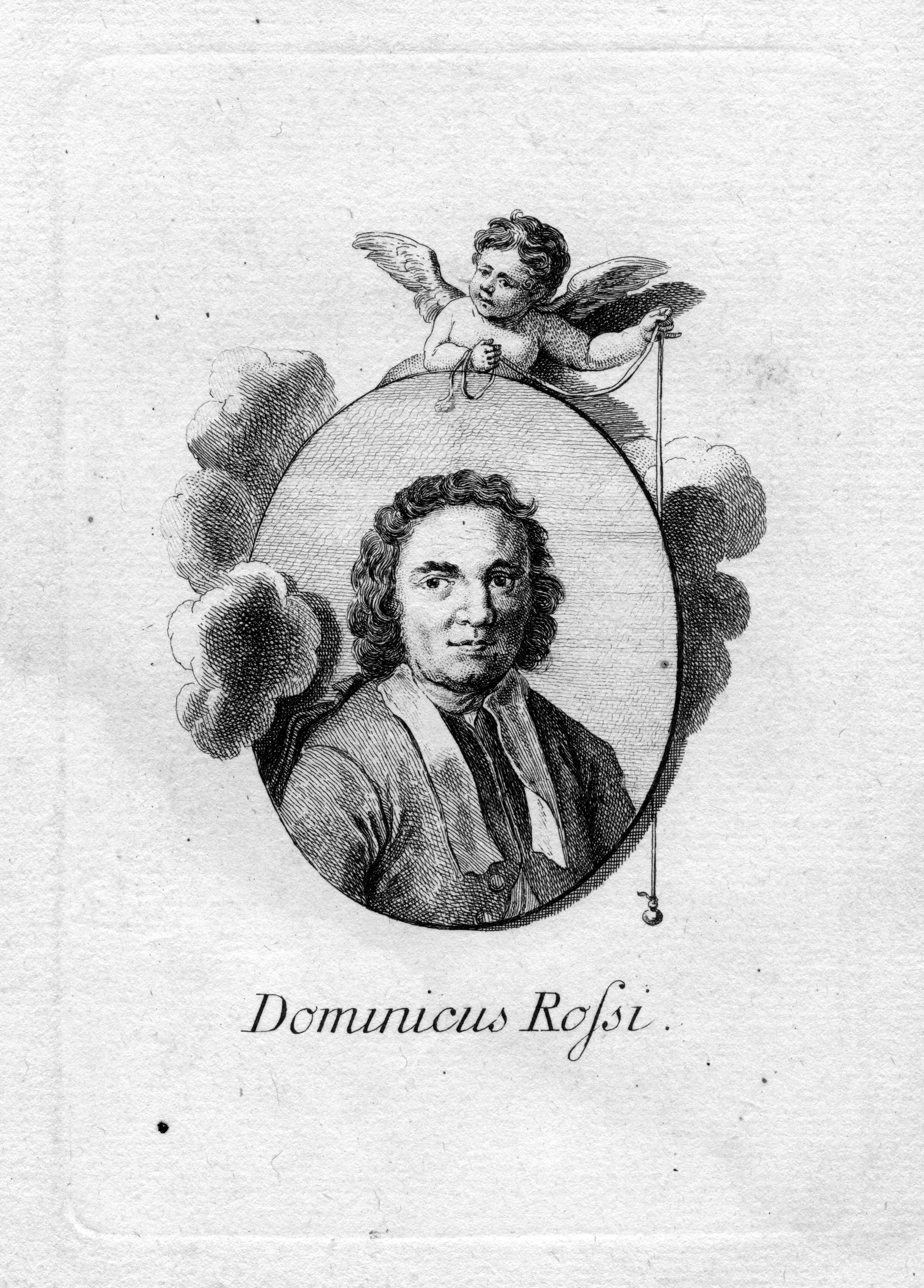 portrait gravé